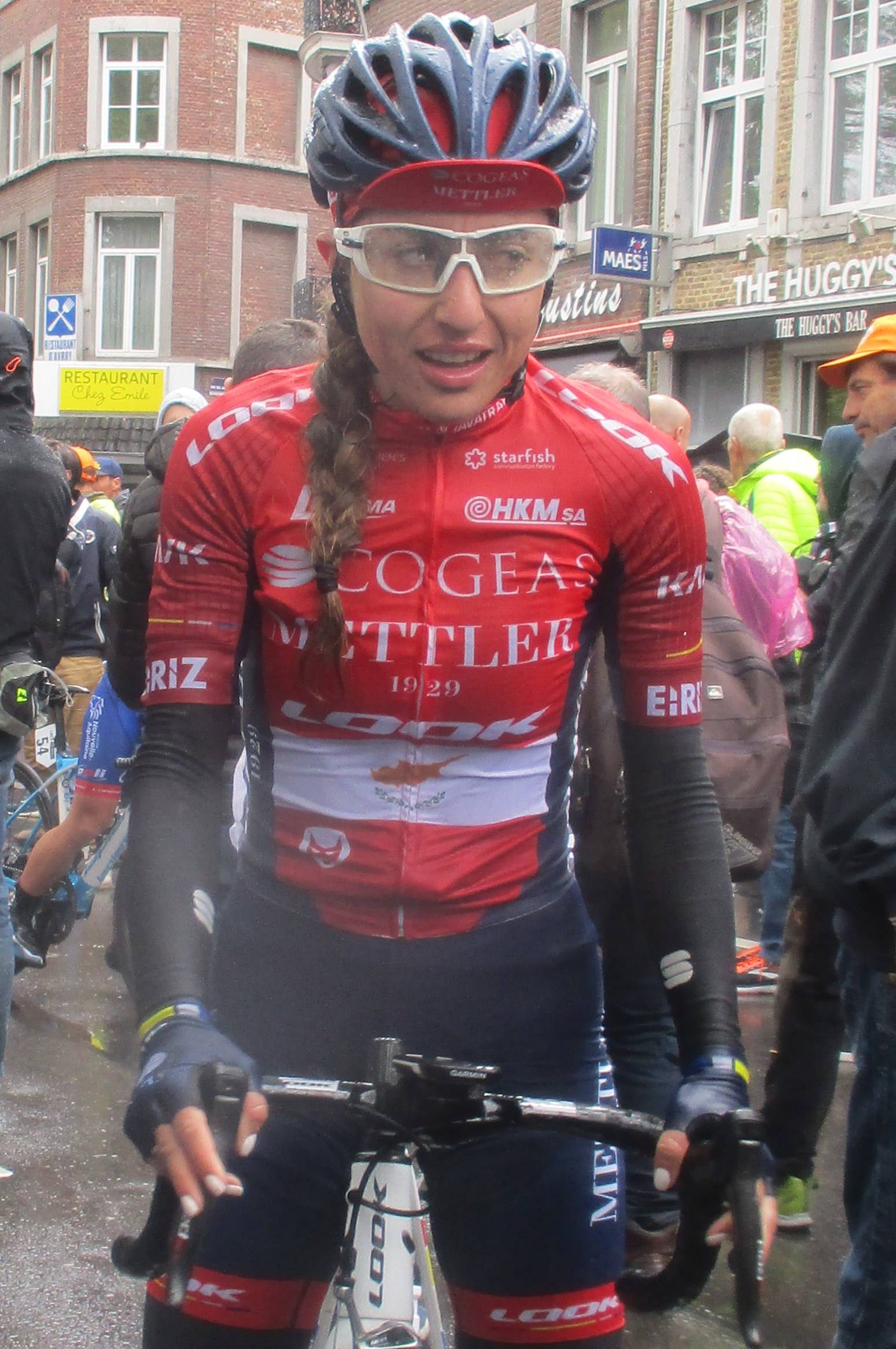 Finish van Luik-Bastenaken-Luik 2019 voor vrouwen op de Boulevard d'Avroy